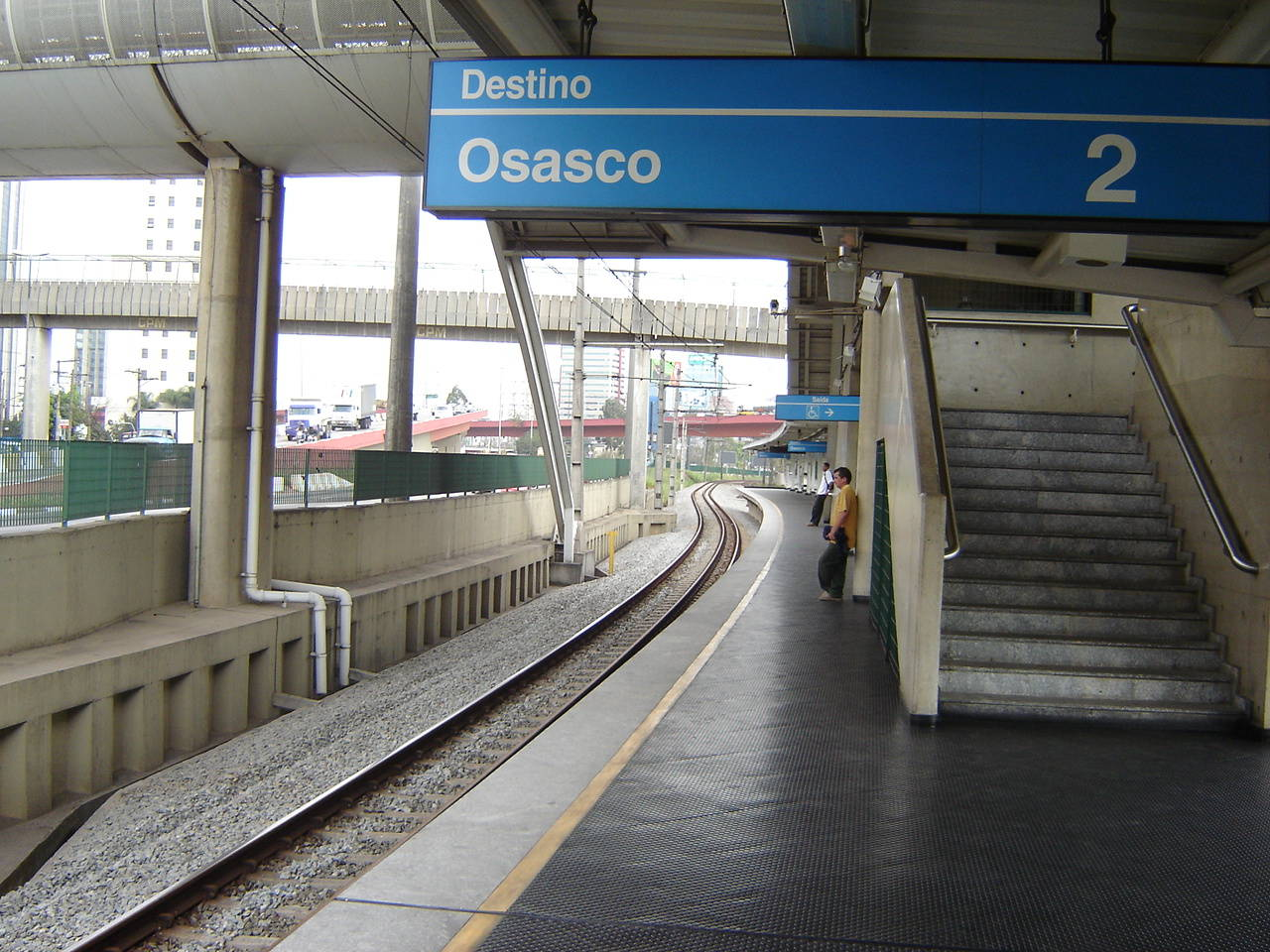 Estação Vila Olímpia Linha C CPTM